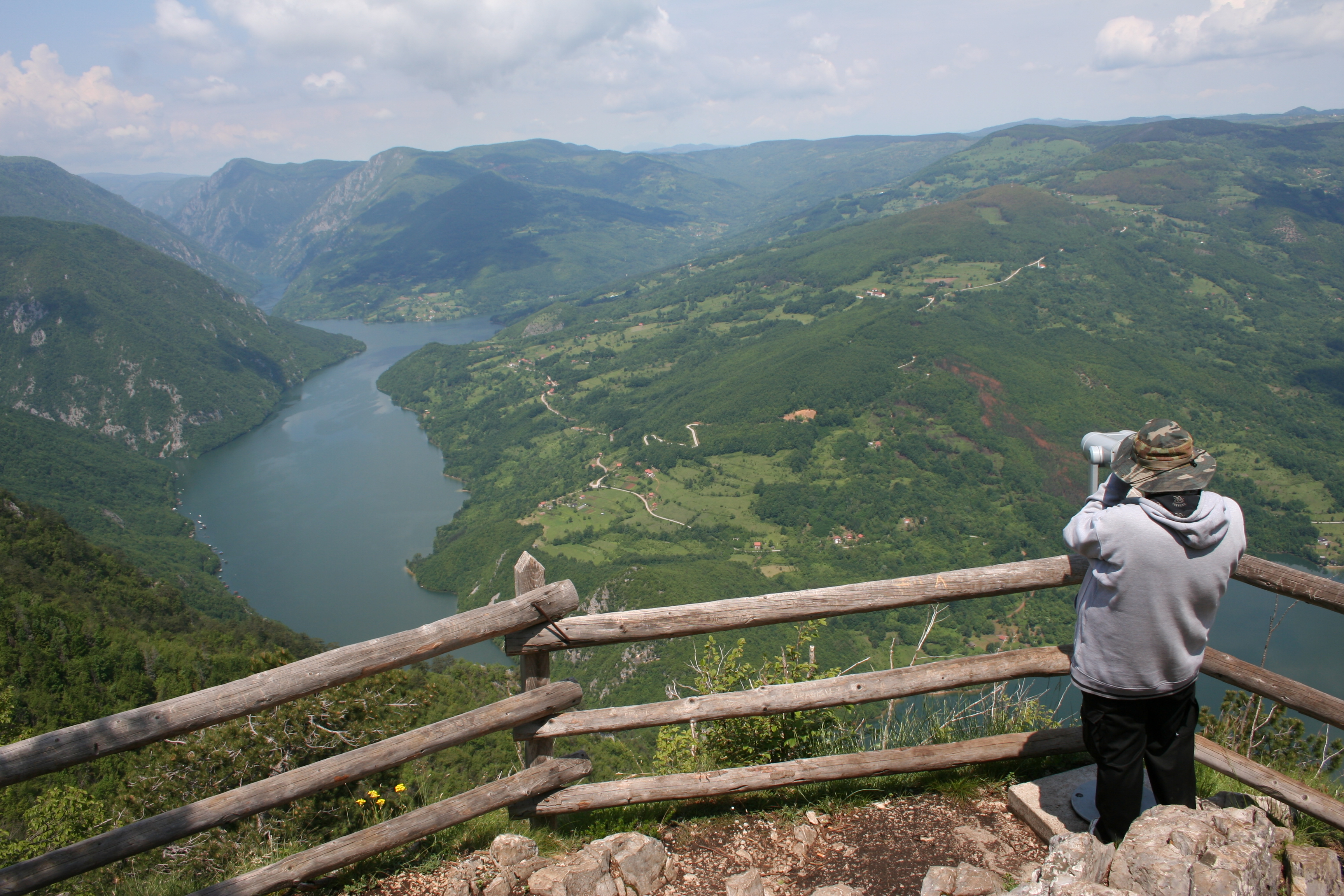 Vidikovac Banjska stena Ово је фотографија заштићеног природног добра у Србији под шифром: НП03 This is a a photo of a natural area in Serbia with ID: НП03